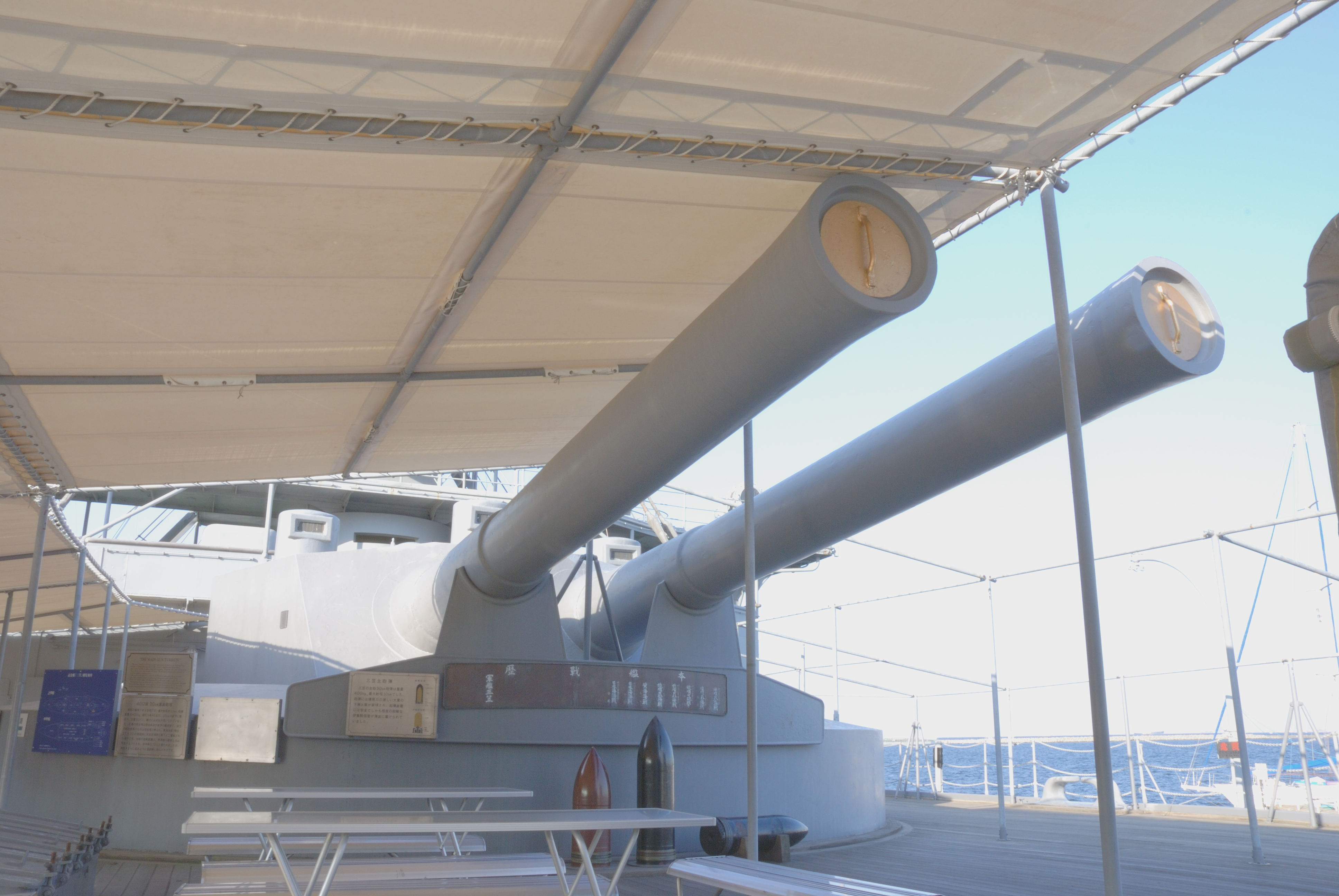 Mikasa kobu shuho